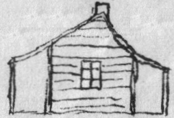 Wohnhaus von Wilhelm Gauß in Point Mo., Zeichnung von Wilhelm Gauß, 1839.